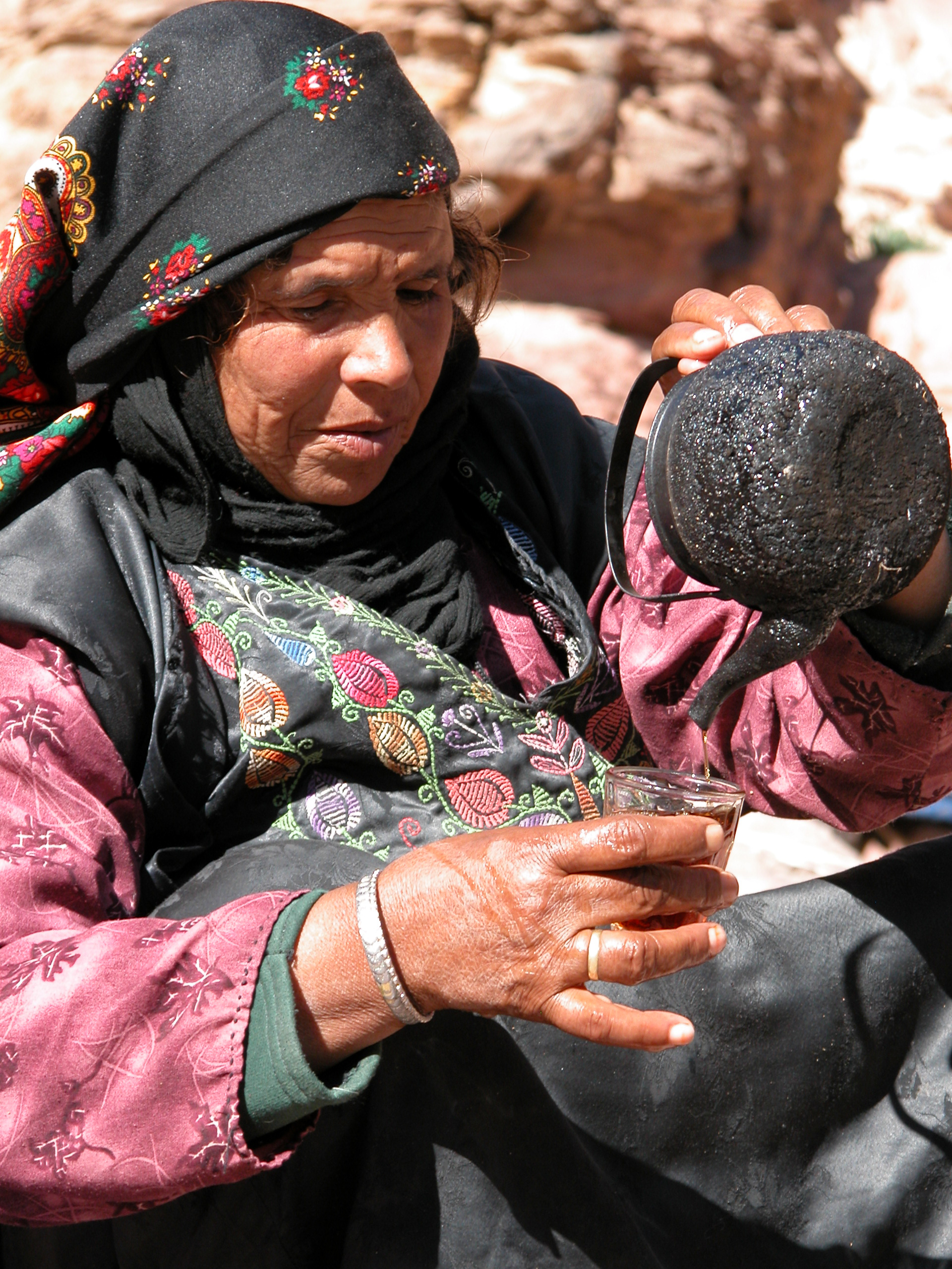 Jordanie, petra, femme servant le thé